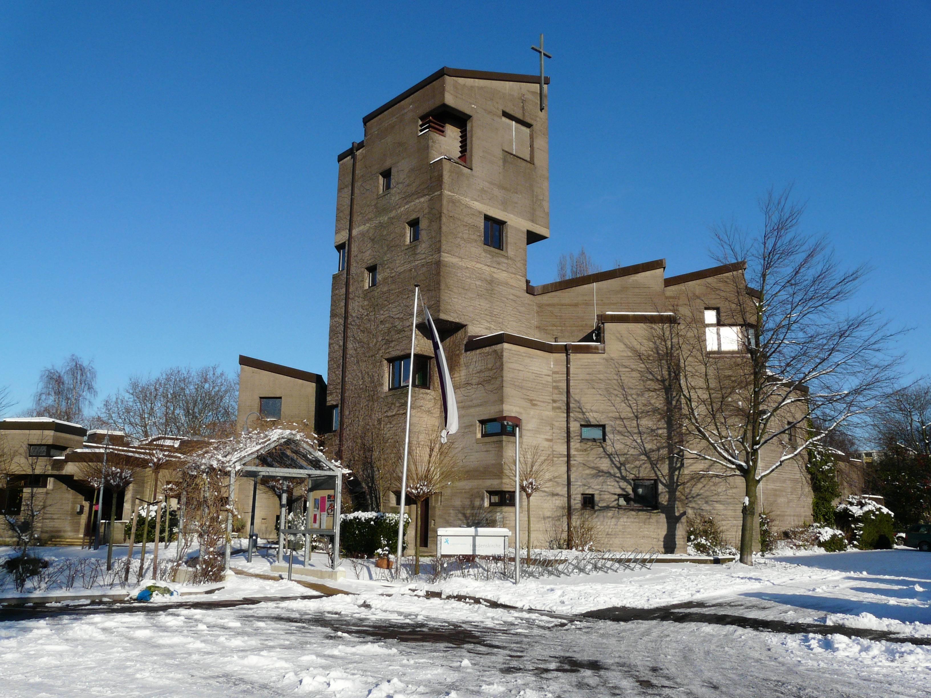 Die Abbildung stellt die Friedenskirche Baumberg in der Ansicht von Süden dar. Durch die fehlende Belaubung der Kletterpflanzen ist die äußere Struktur zu dieser Jahreszeit besser sichtbar.